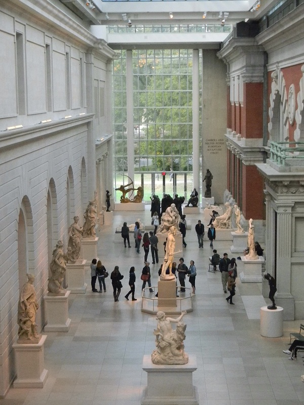 Metropolitan museum of Art, galerie des sculpteurs 2012